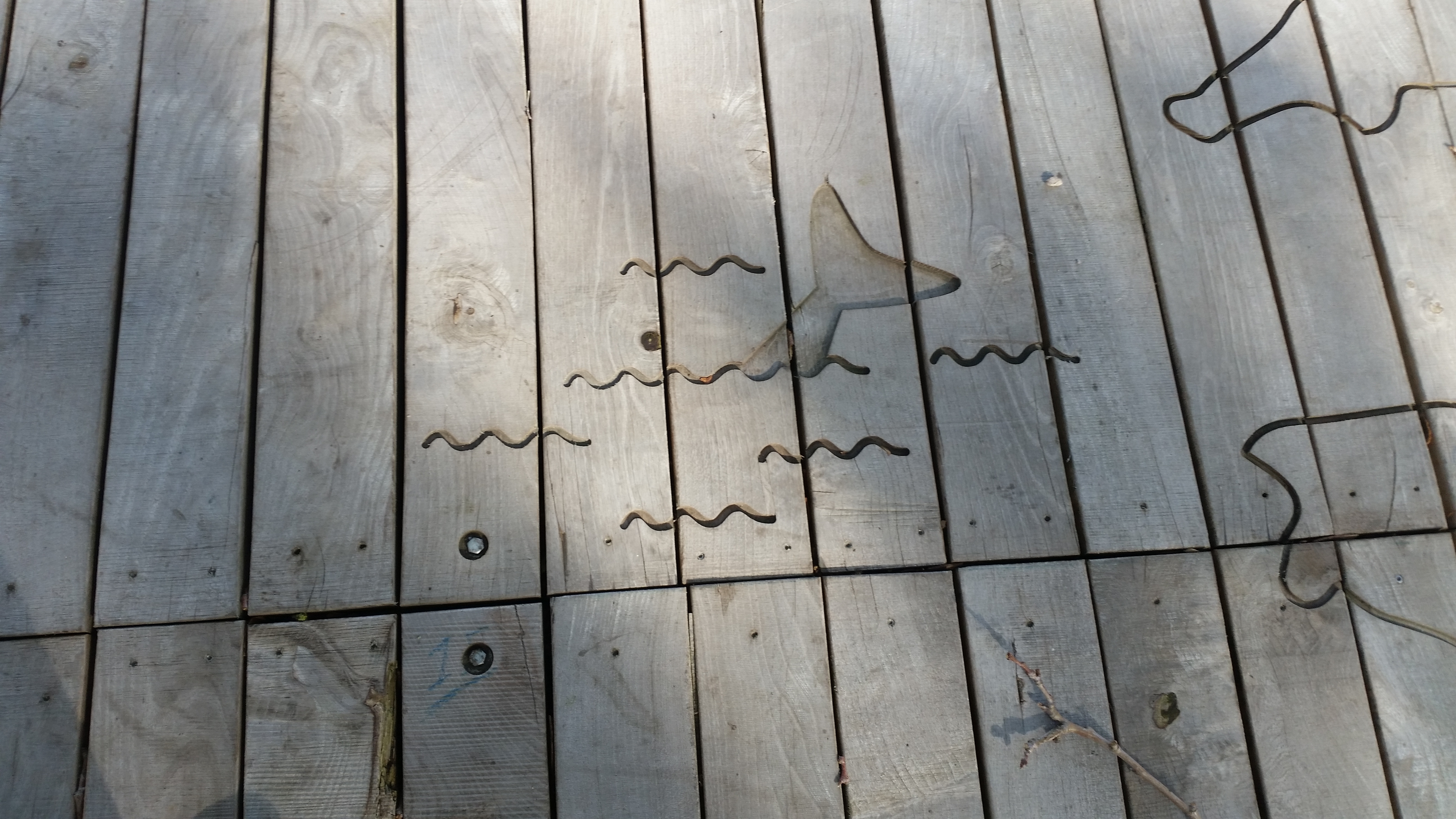 Wegduikende walvis op de Zeeslagenkaart